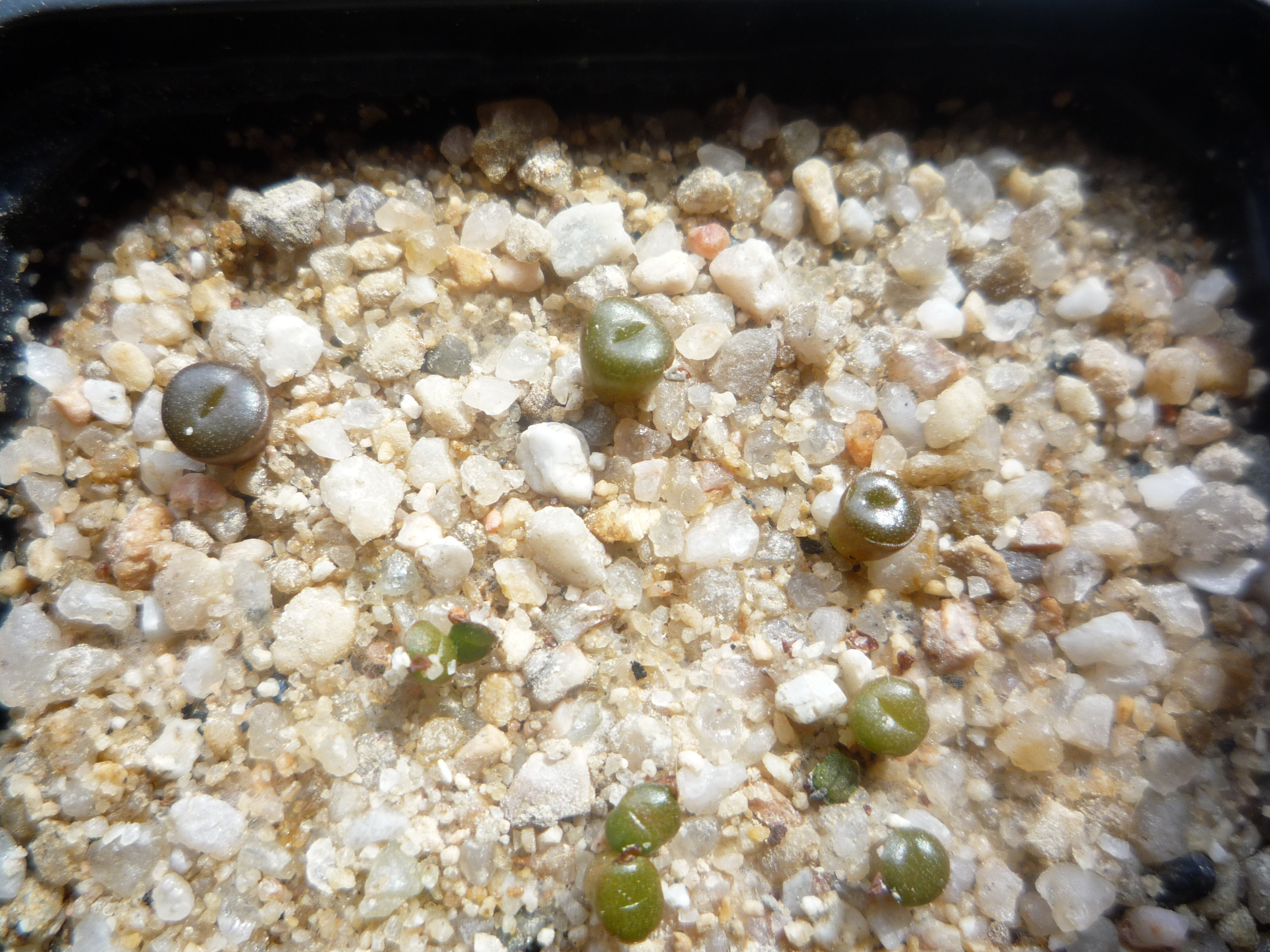 Semillero de Lithops aucampiae ssp. aucampiae v. koelemanii(C256) y Lithops otzeniana(C350). Sembradas el 16/02/09, habiendo pasado casi 2 meses desde la siembra.